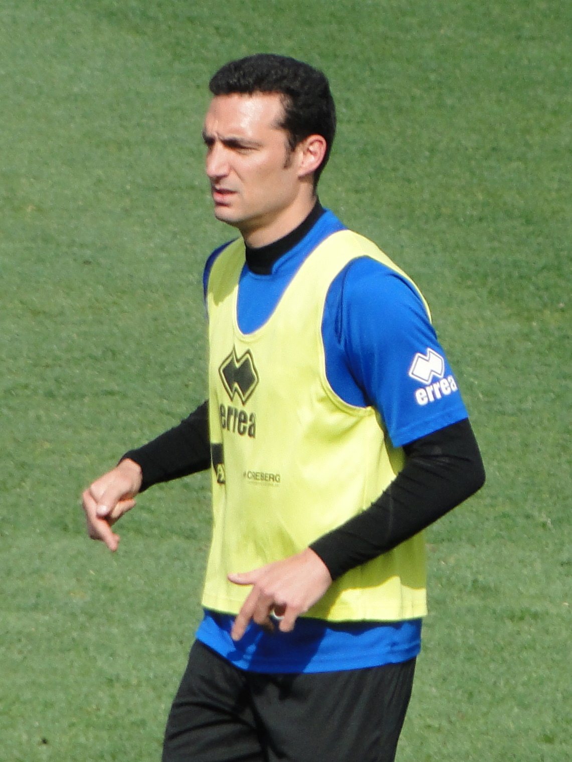 Lionel Scaloni, calciatore argentino